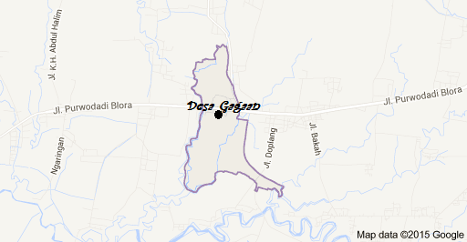 Peta Desa Gagaan